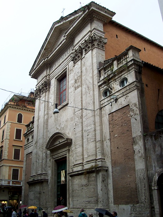 Roma - Chiesa di Gesù e Maria